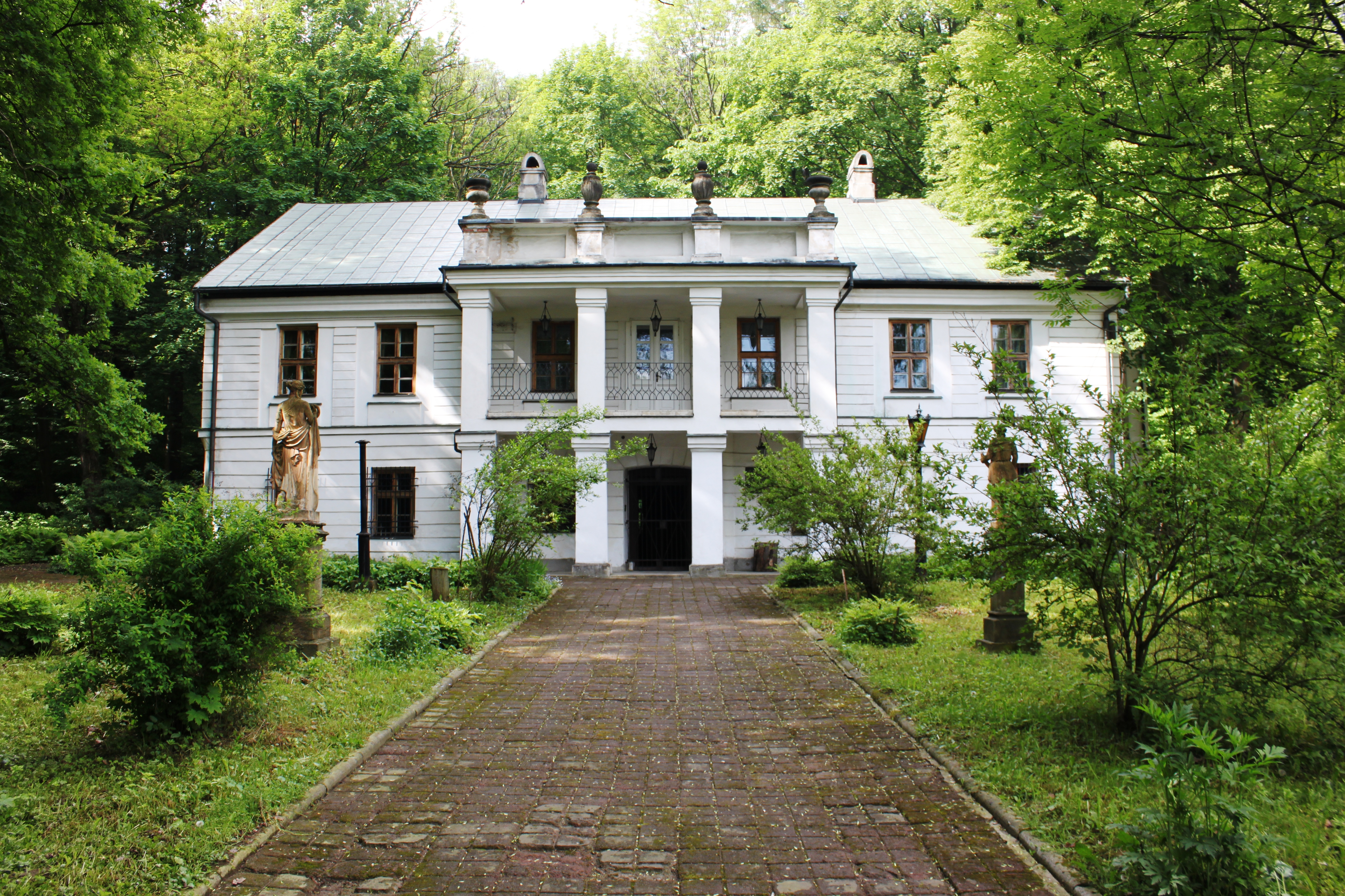 Gorzeń Górny, dwór, ob. Muzeum Emila Zegadłowicza, 1 poł. XIX, XX